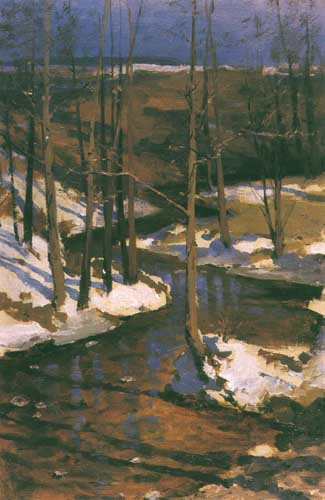 Весна